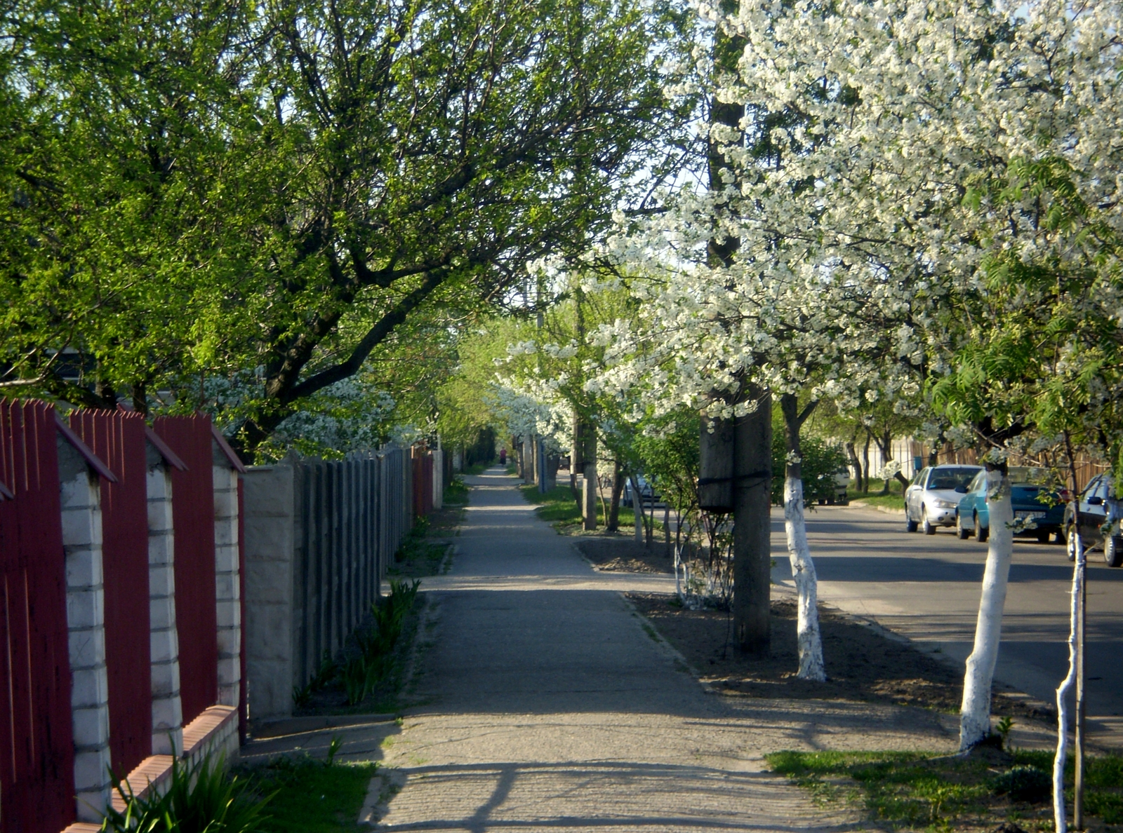 Тратуар вул. Баброва